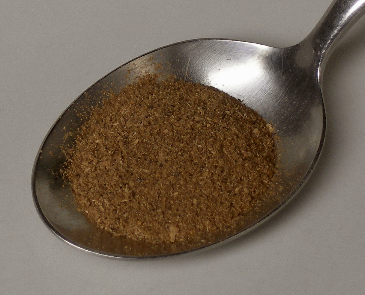 Pilzpulver